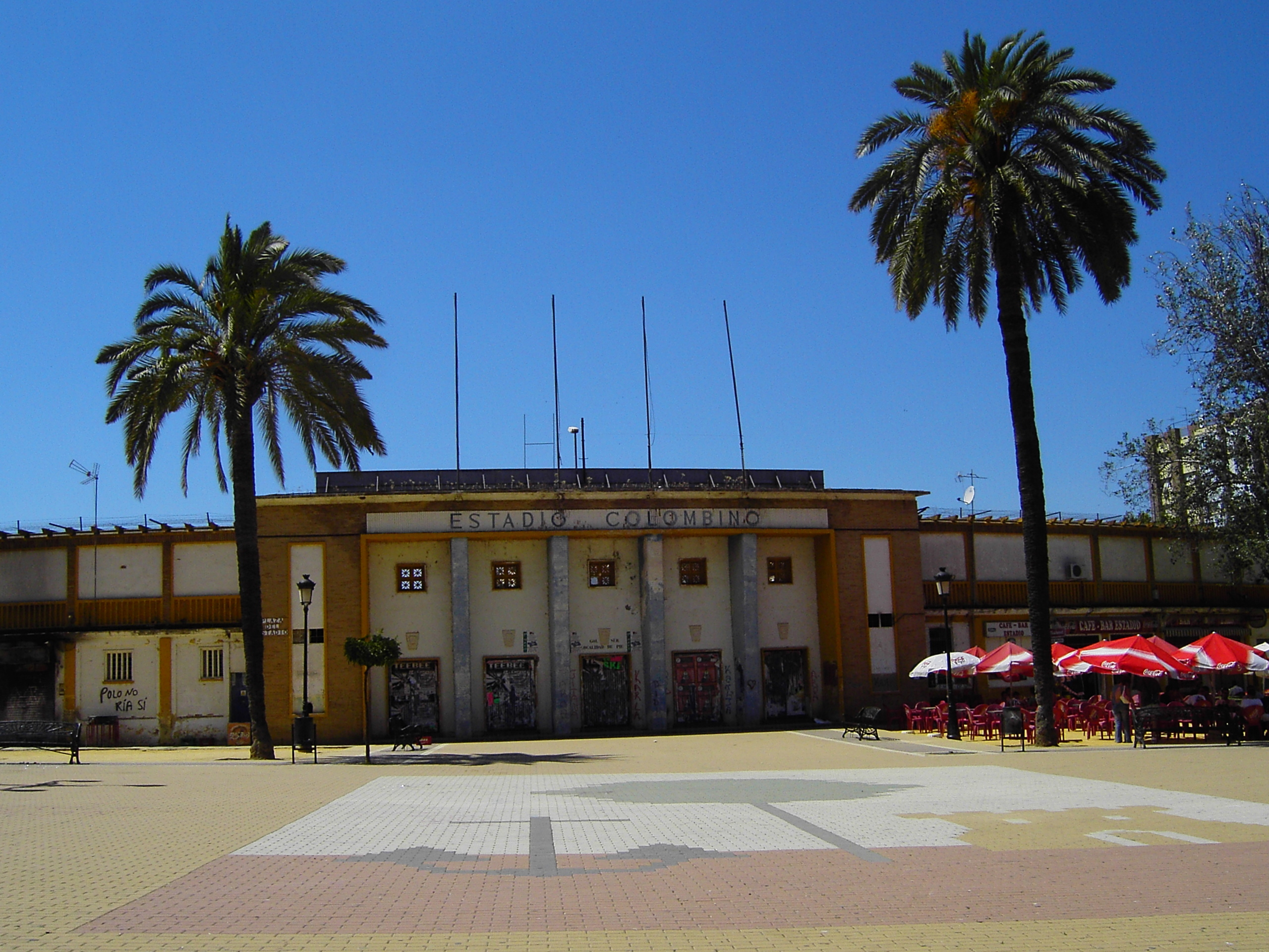 Antiguo Estadio Colombino de Huelva